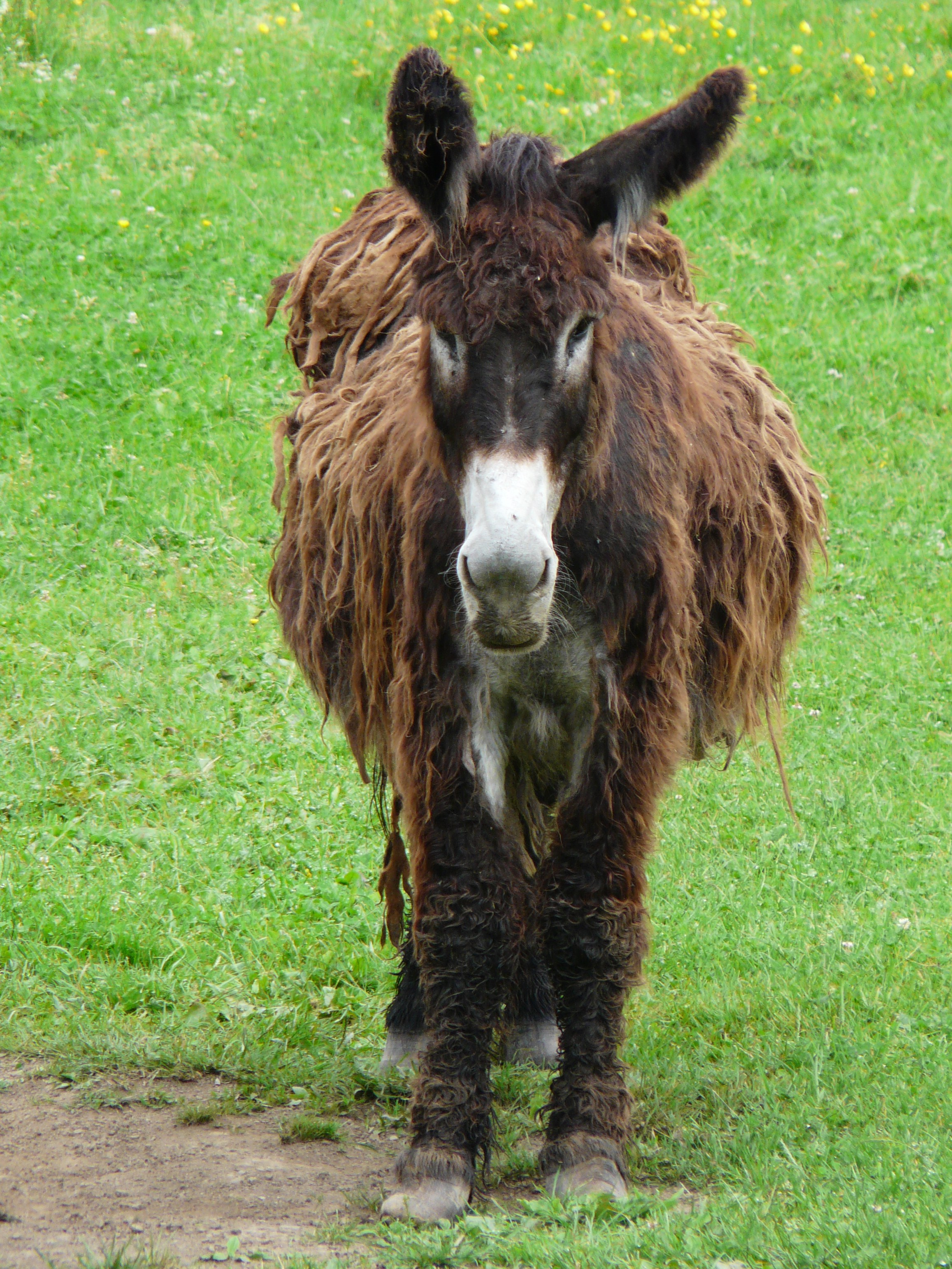 Femelle de baudet du Poitou, Haute-Garonne, France.